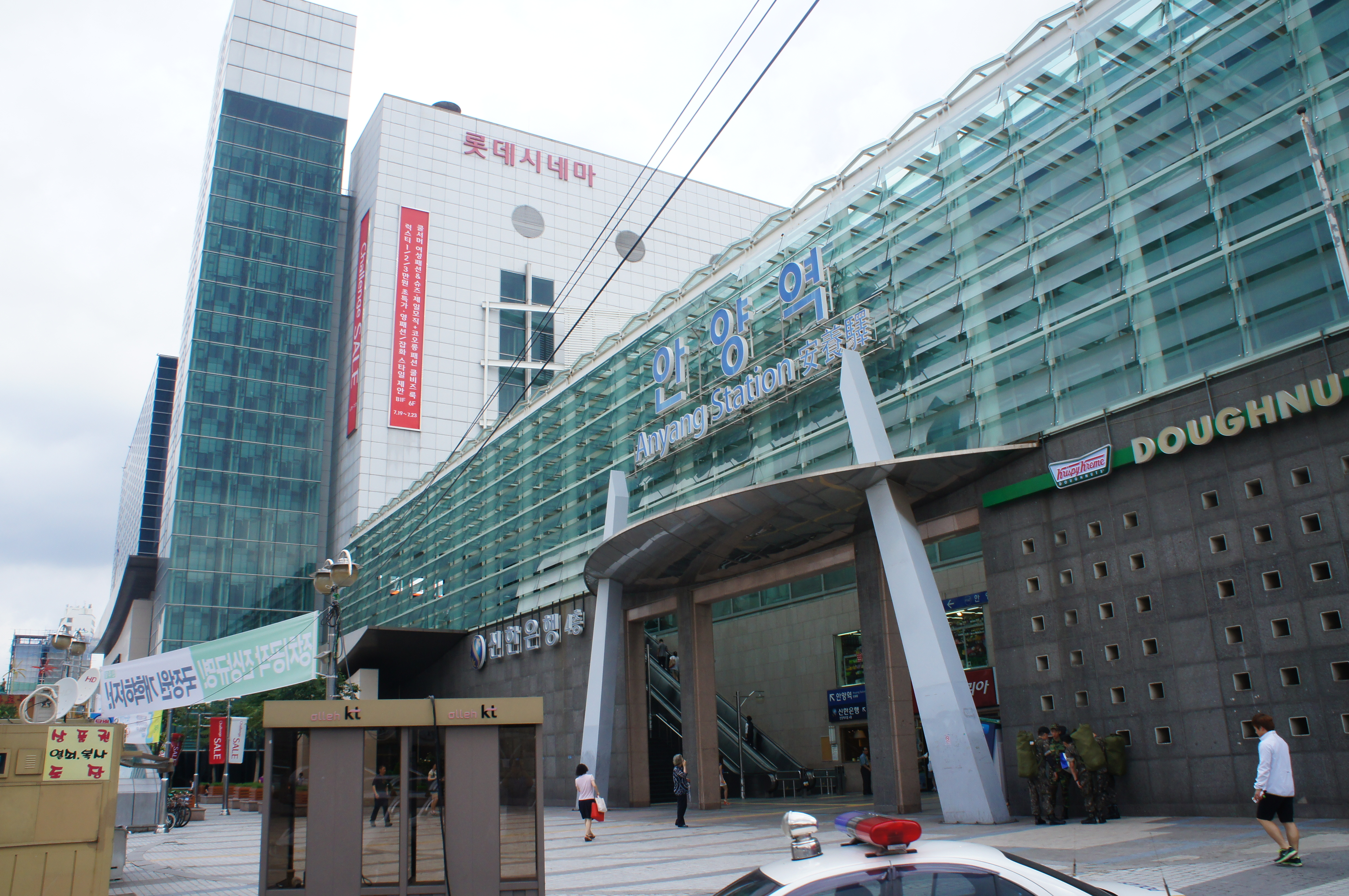 안양역 역사